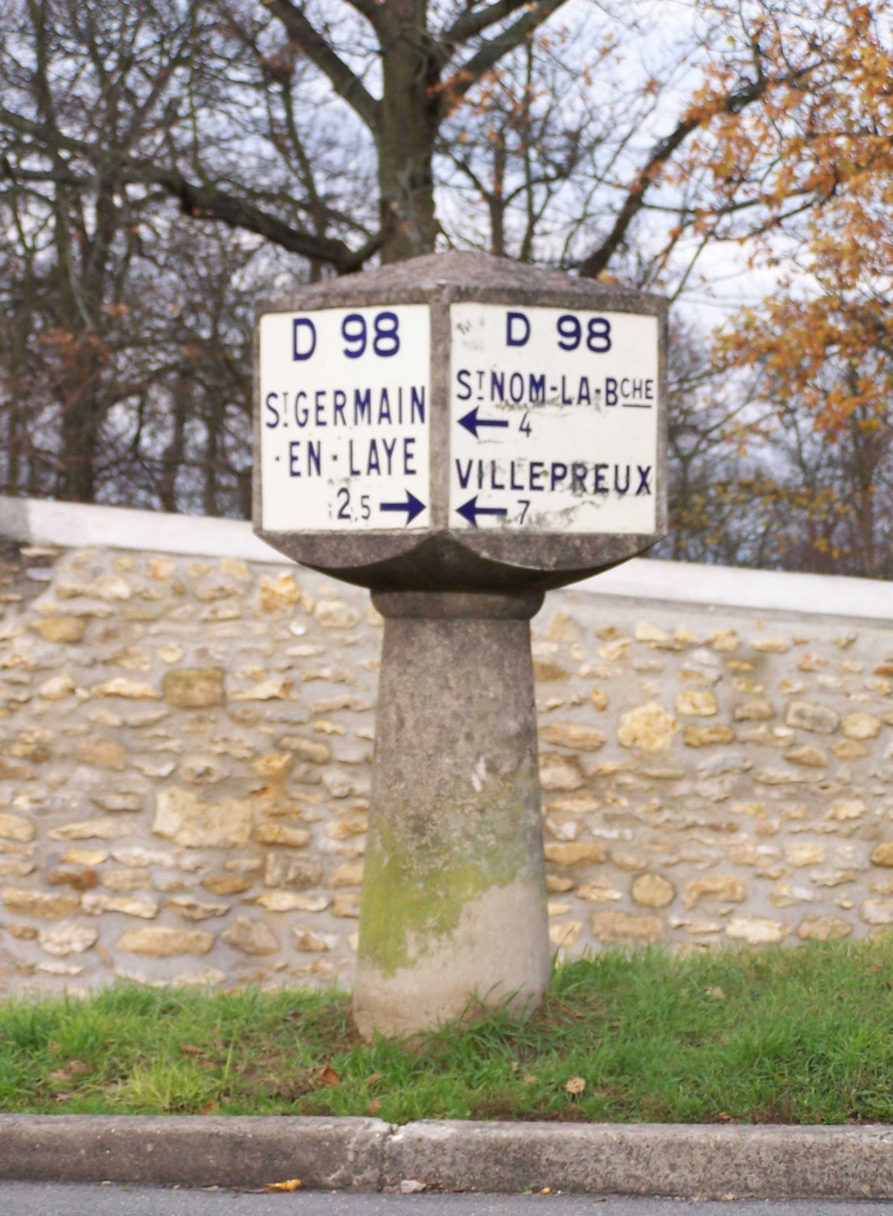 Ancienne borne de la départementale 98 Fourqueux (Yvelines, France)